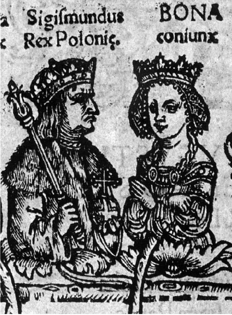 Sigismondo Iagellone e la moglie Bona Sforza, in Albero genealogico degli Iagelloni (particolare), da Iodocus Ludovicus Decius, De Sigismondi Regis temporibus, Cracovia 1521, Museo Nazionale, Cracovia, in M. S. Calò Mariani e G. Dibenedetto, Bona Sforza regina di Polonia e duchessa di Bari, Roma, 2000.